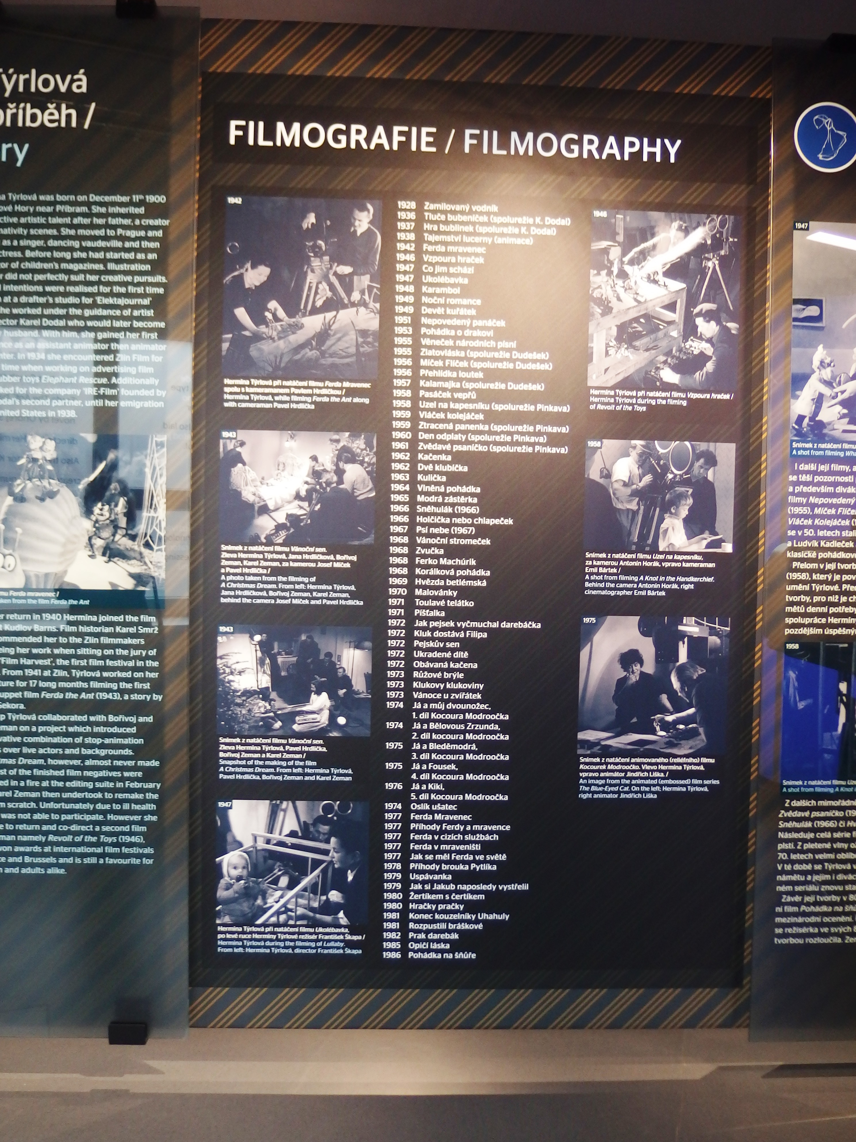 Filmový uzel Zlín, zábavní park, Filmová 689, Zlín-Kudlov.